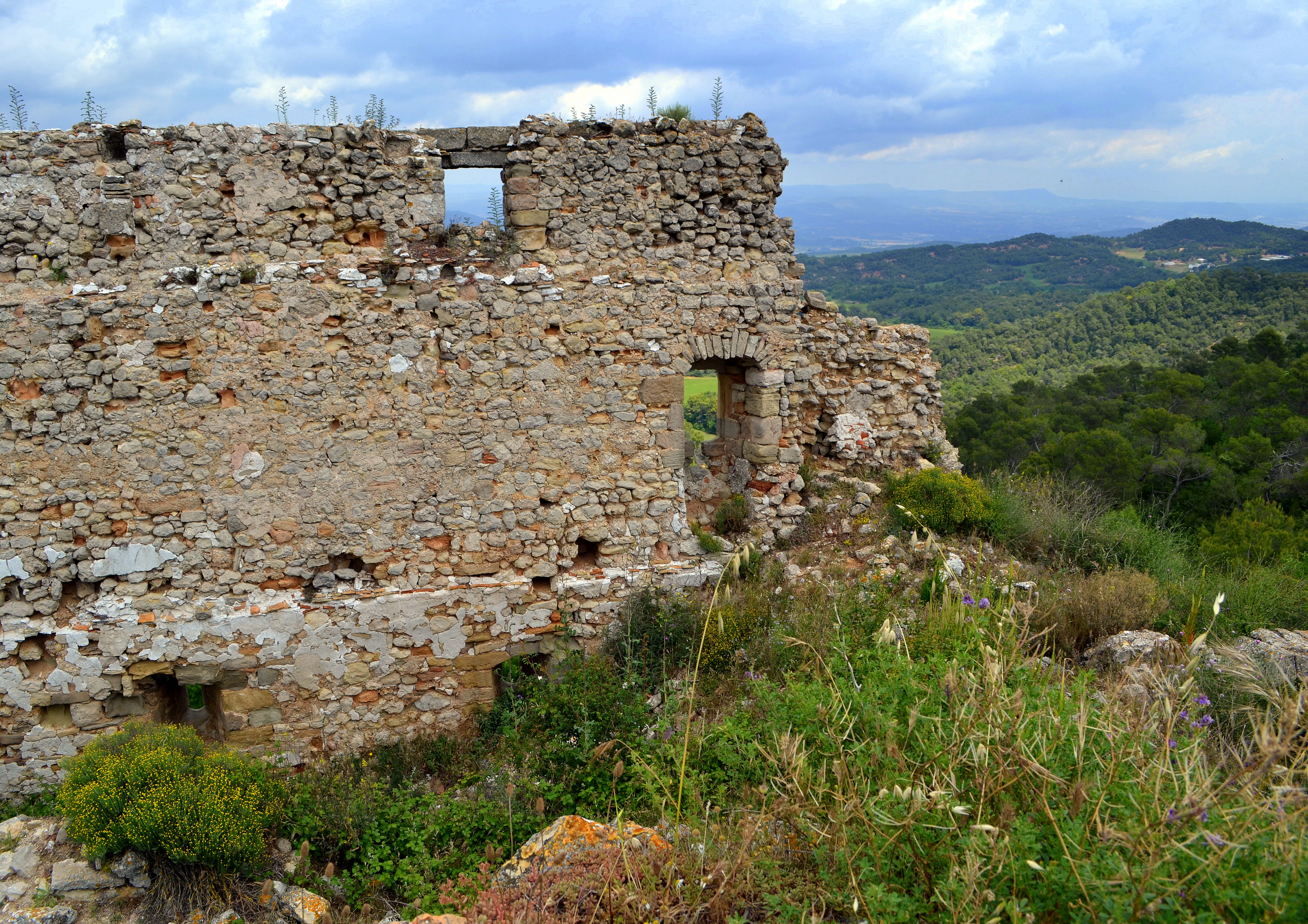 Castell de Queralt (Bellprat)